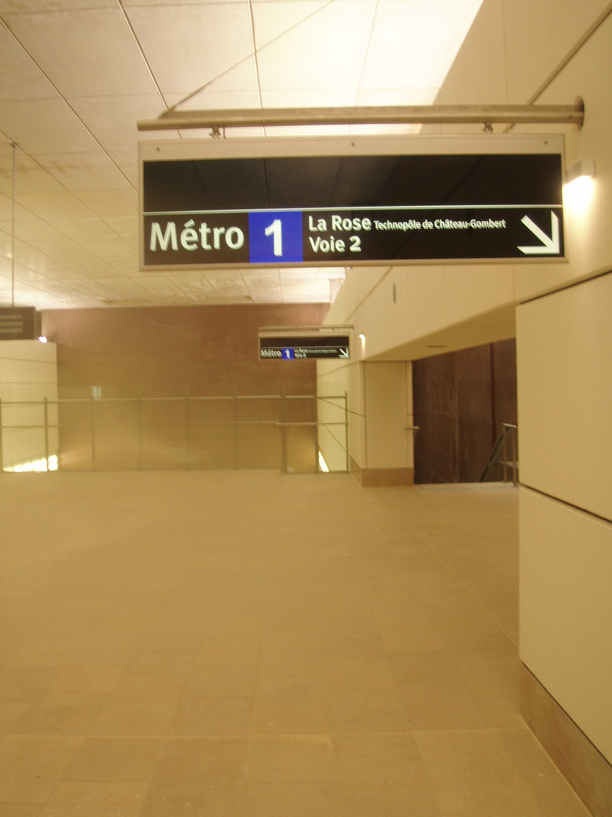 Station terminus de la ligne 1 du métro de Marseille "La Fourragère".